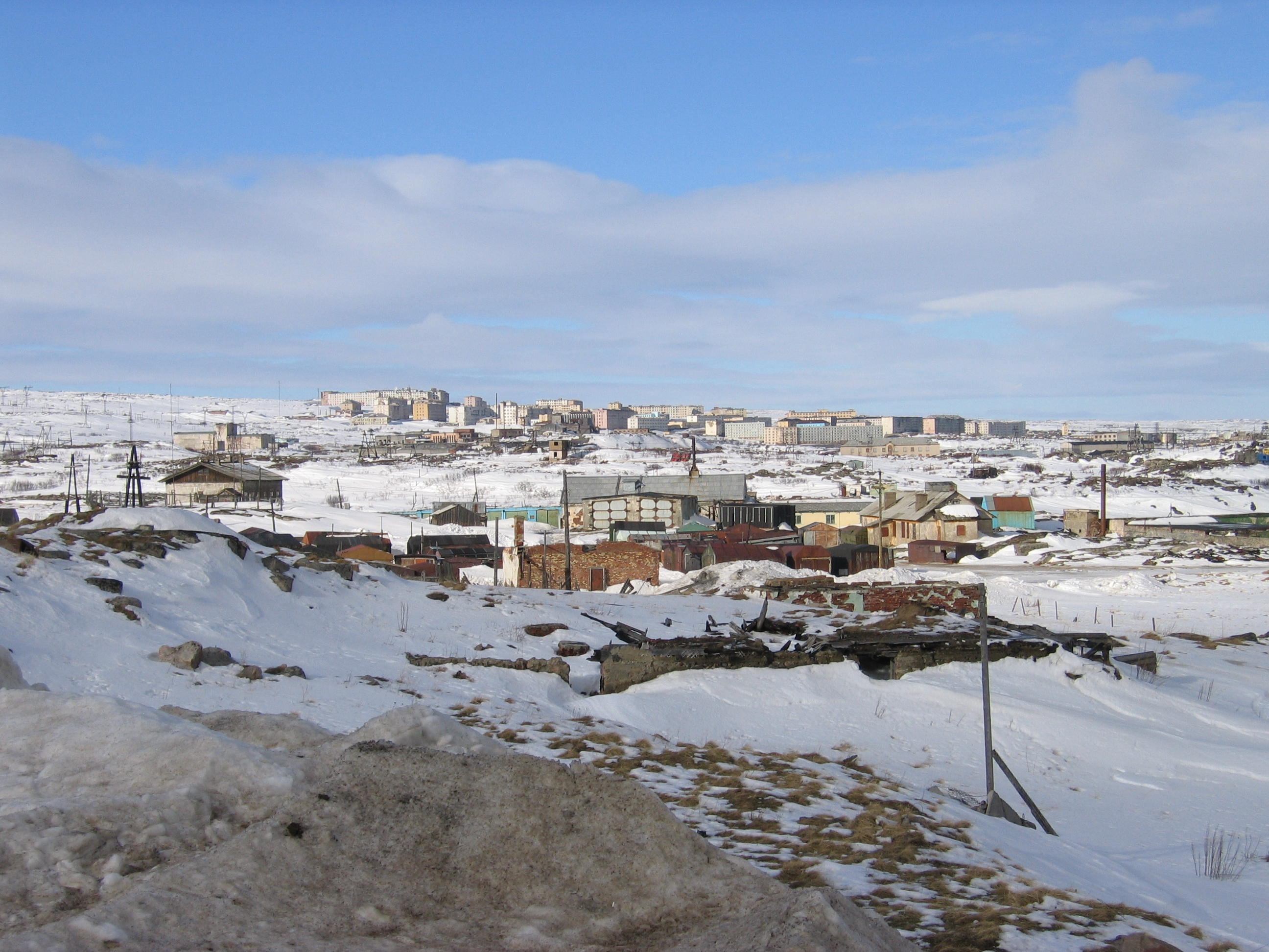 Вид на Островной